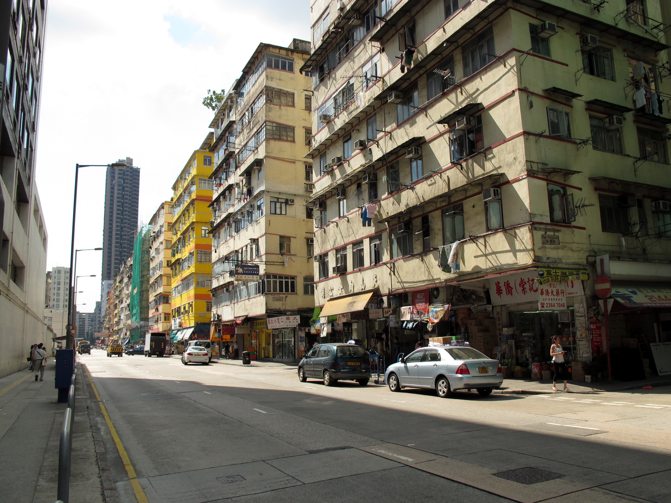 Ma Tou Kok Road